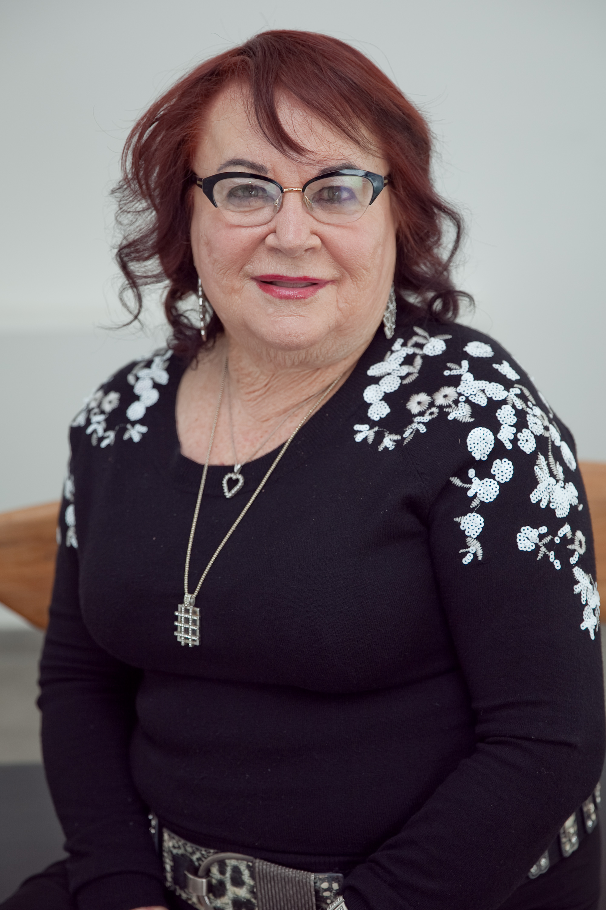 ד"ר צפורה שפירא, הייתה יועצת לשון בקול ישראל, וכעת יועצת לשון של עיריית תל אביב ועוד..